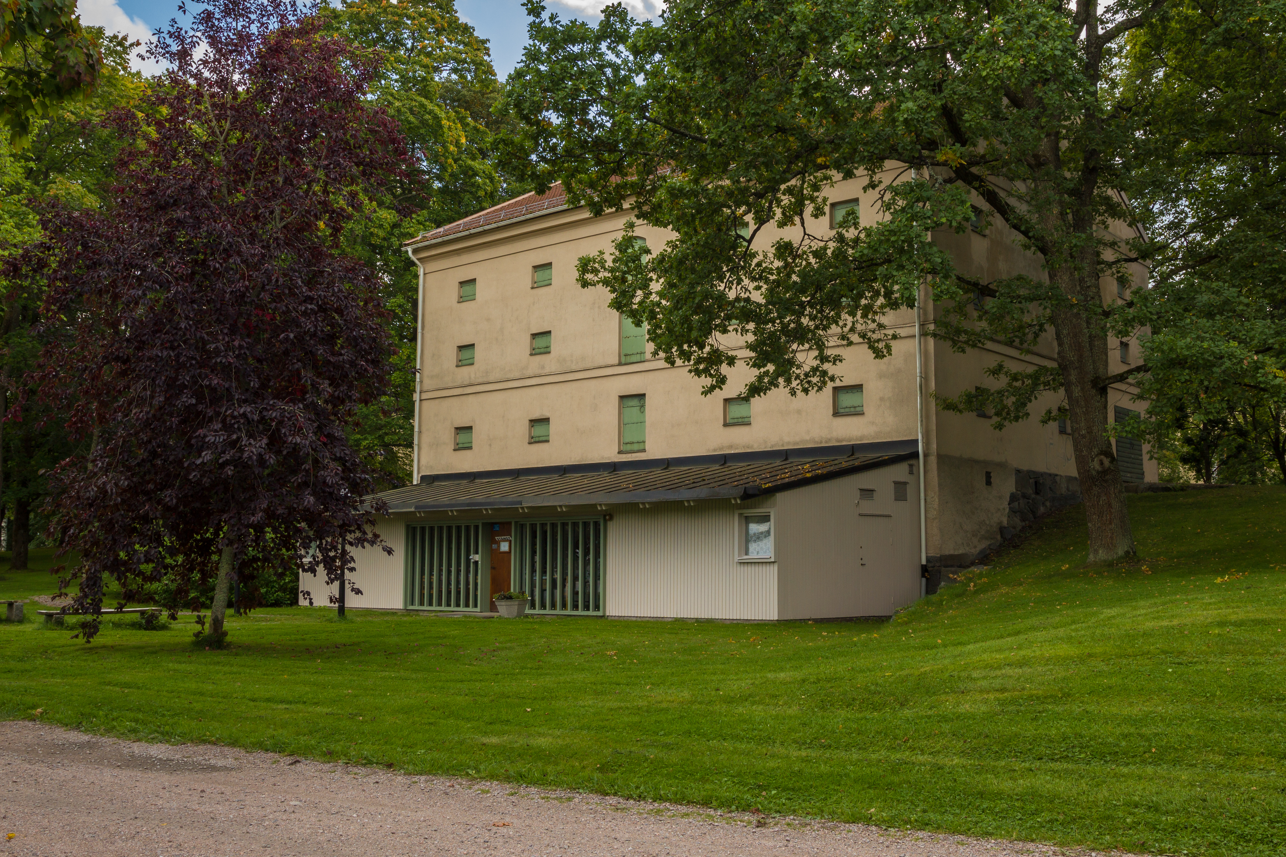 Avesta myntmuseum. Avesta, Avesta kommun, Sverige